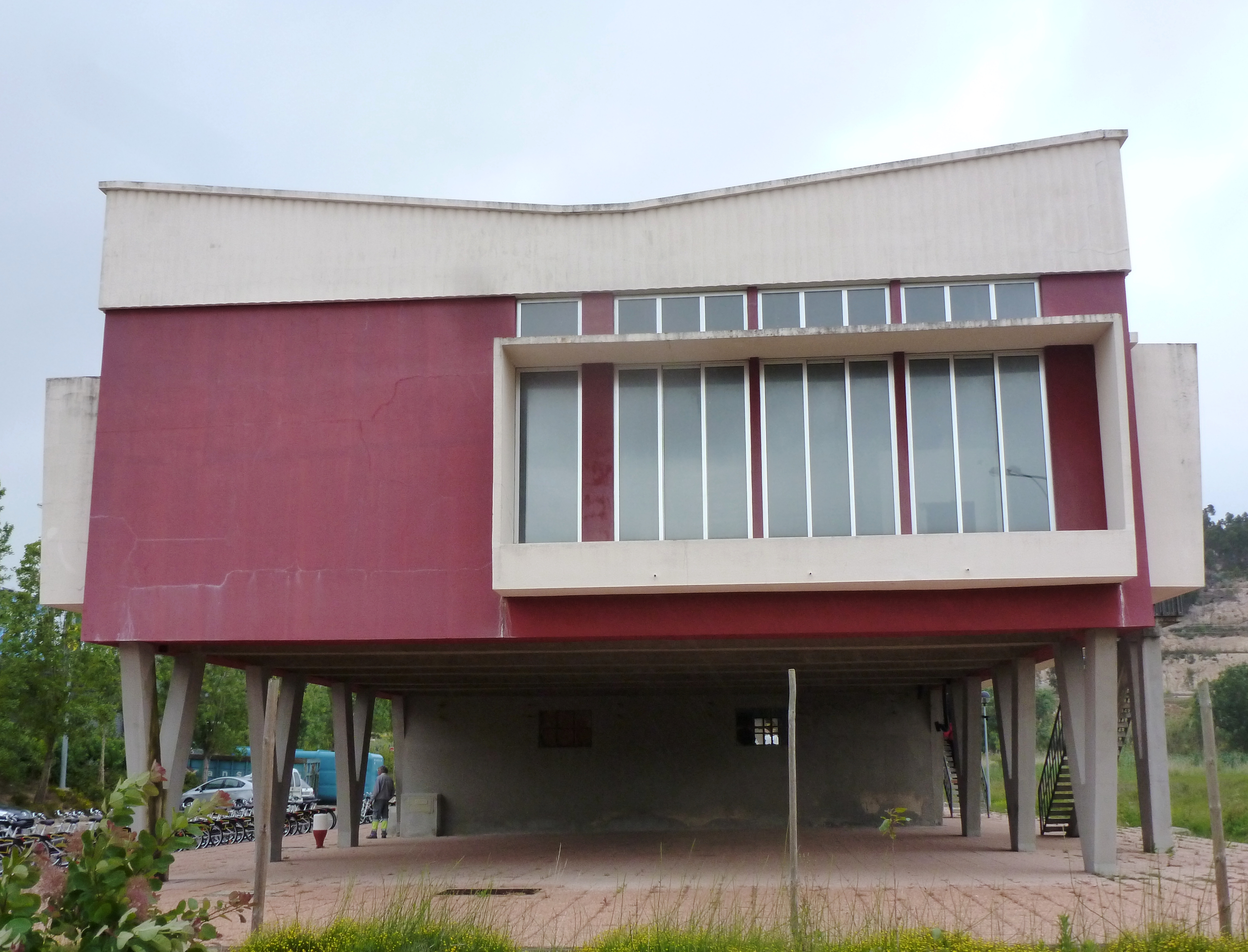 Building of the future museum for Joaquim Agostinho in Torres Vedras